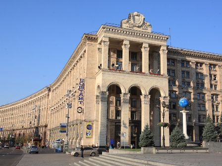 Генеральна дирекція Укрпошти (01001, м. Київ, вул. Хрещатик, 22)